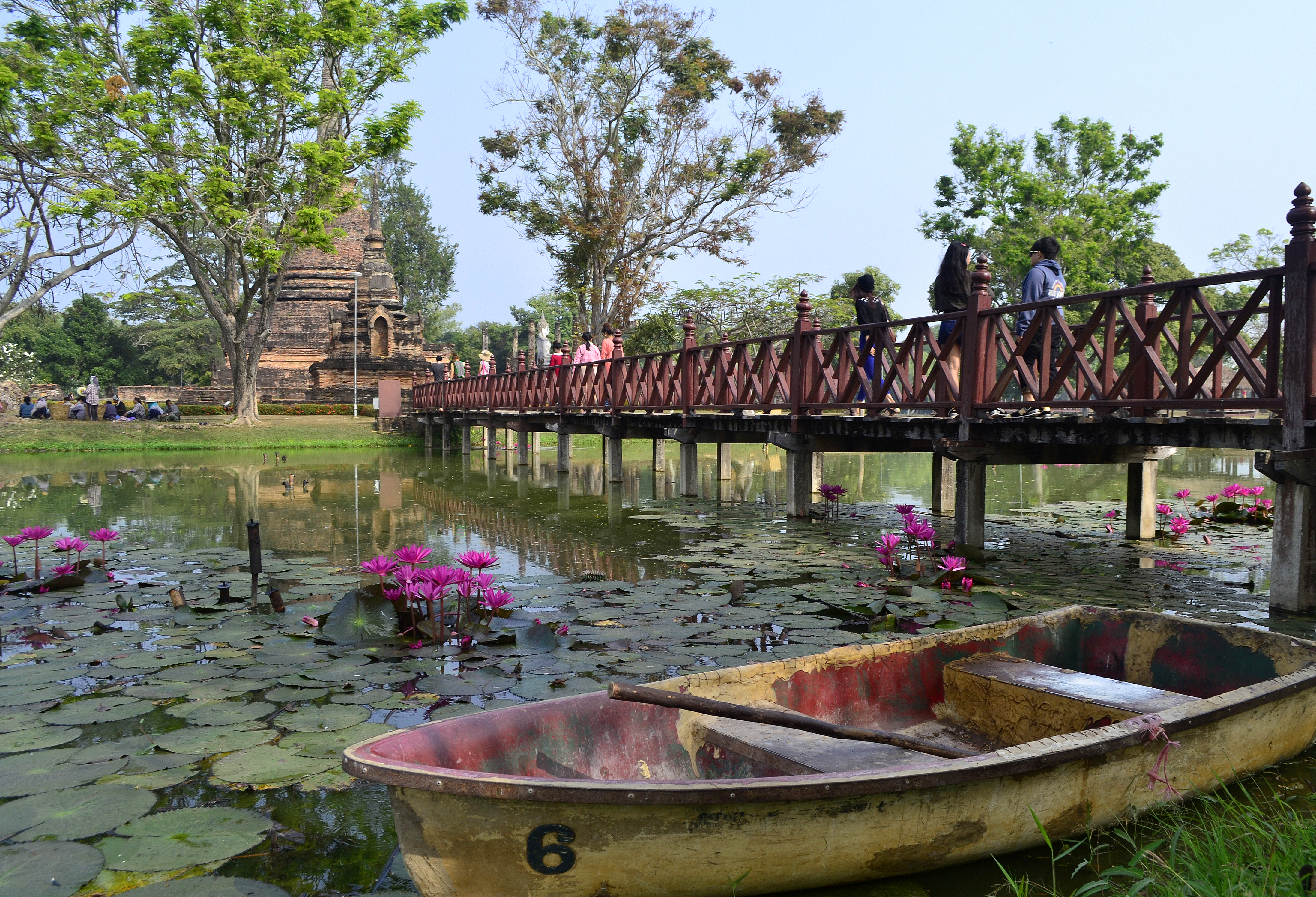 Brücke zur Insel und Chedi des Wat Sa Si im Geschichtspark Sukhothai